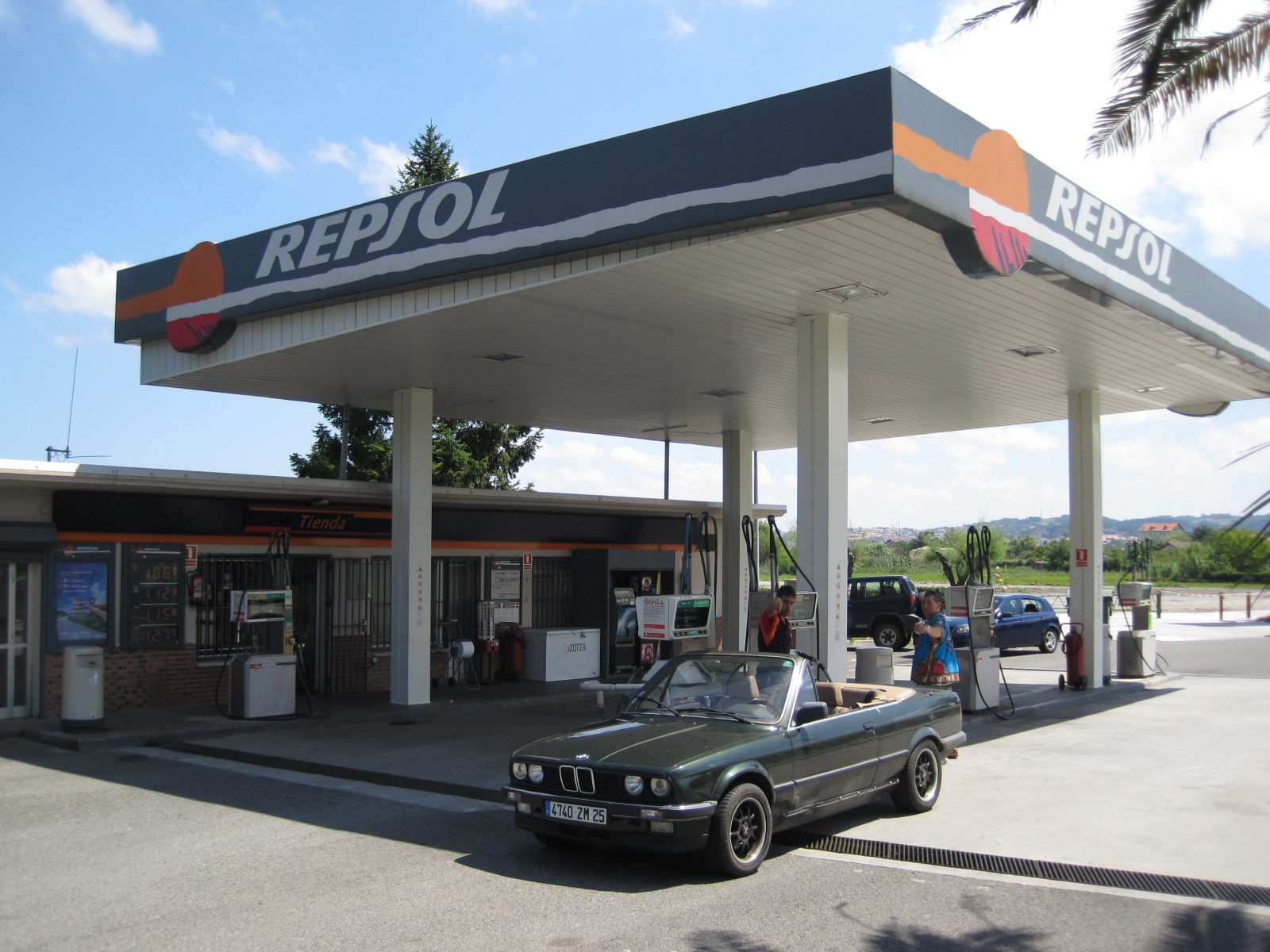 Station service Repsol à la frontière Espagnole